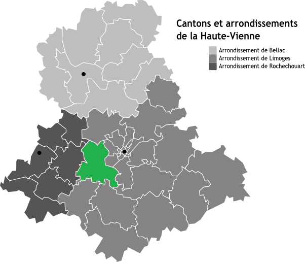 Canton d'Aixe-sur-Vienne, Limousin, France en Carte des arrondissements de la Haute-Vienne